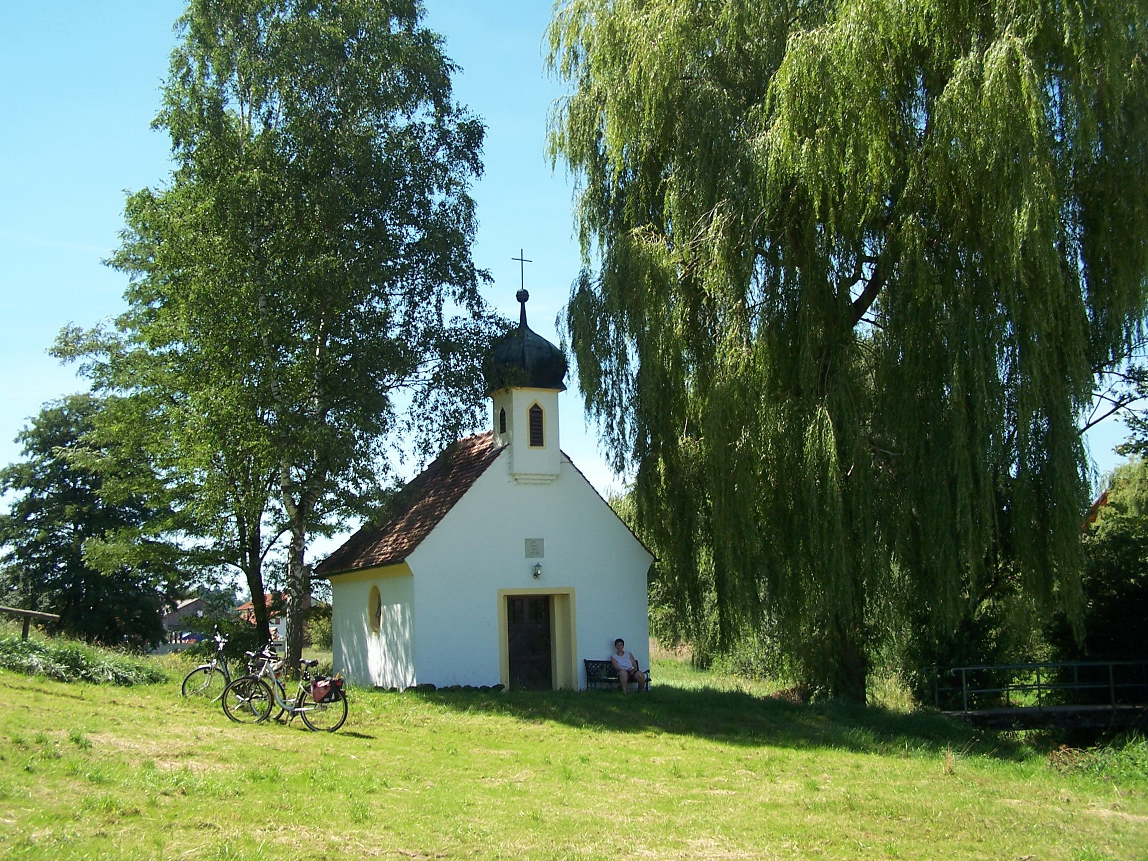 Rainertshausen. Sog. Erhardsbrunnkapelle. 1835; mit Ausstattung.